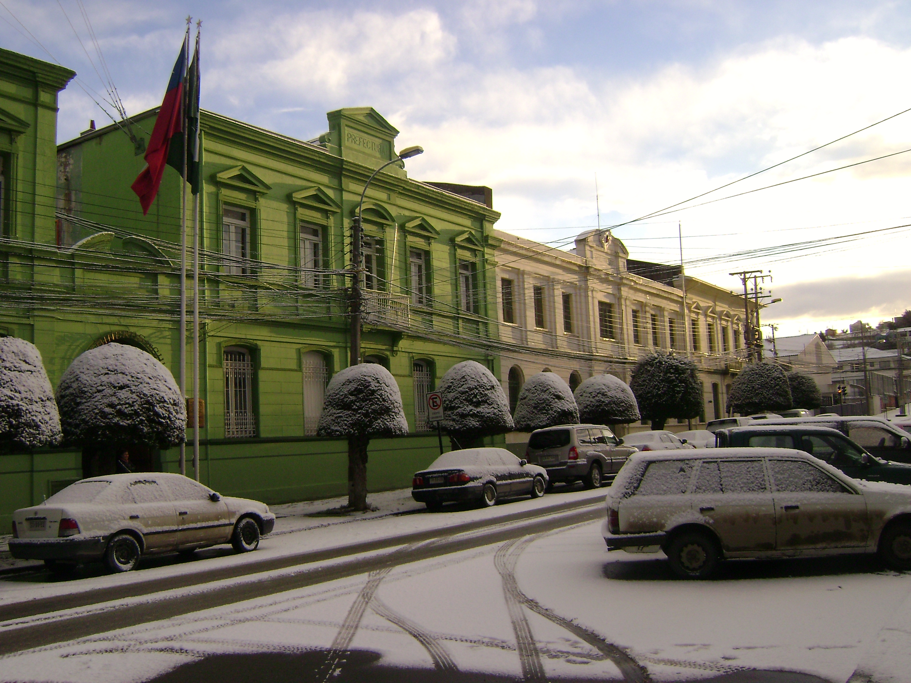 Edificios donde funcionaron la Primera comisaria de Punta Arenas y la Carcel Publica, edificio que en la actualidad se utiliza para realizar eventos culturales. This is a photo of a national monument in Chile: 2138